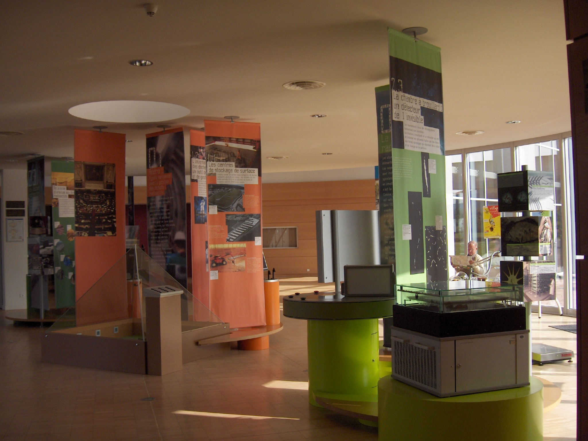 Communication visuelle à l'Espace Information du Laboratoire de recherche souterrain de Meuse/Haute-Marne à Bure